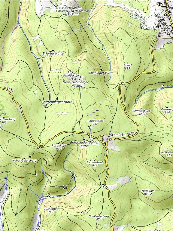 Topographische Karte vom Schneekopf